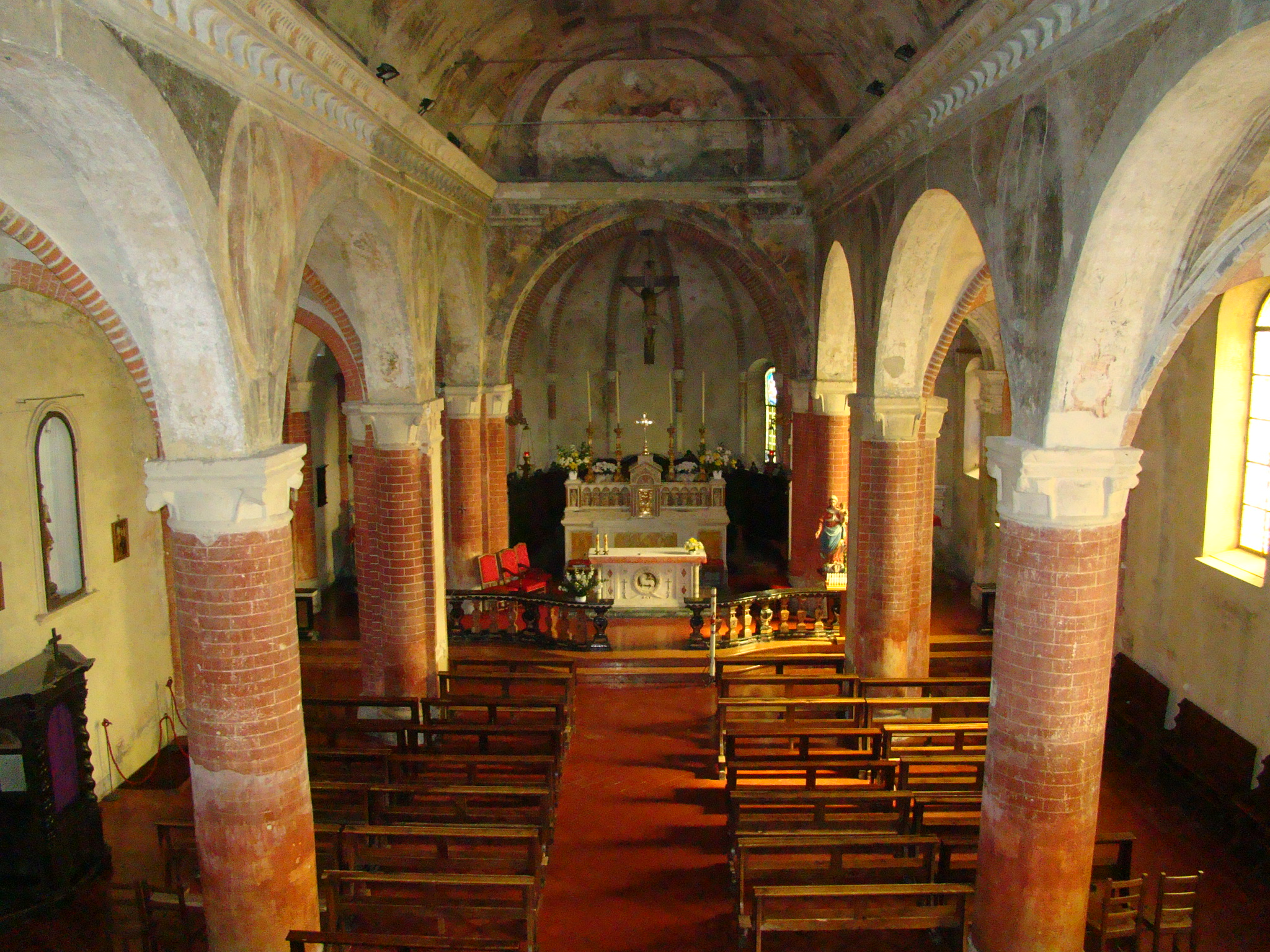 S.Salvatore - interno, navata centrale